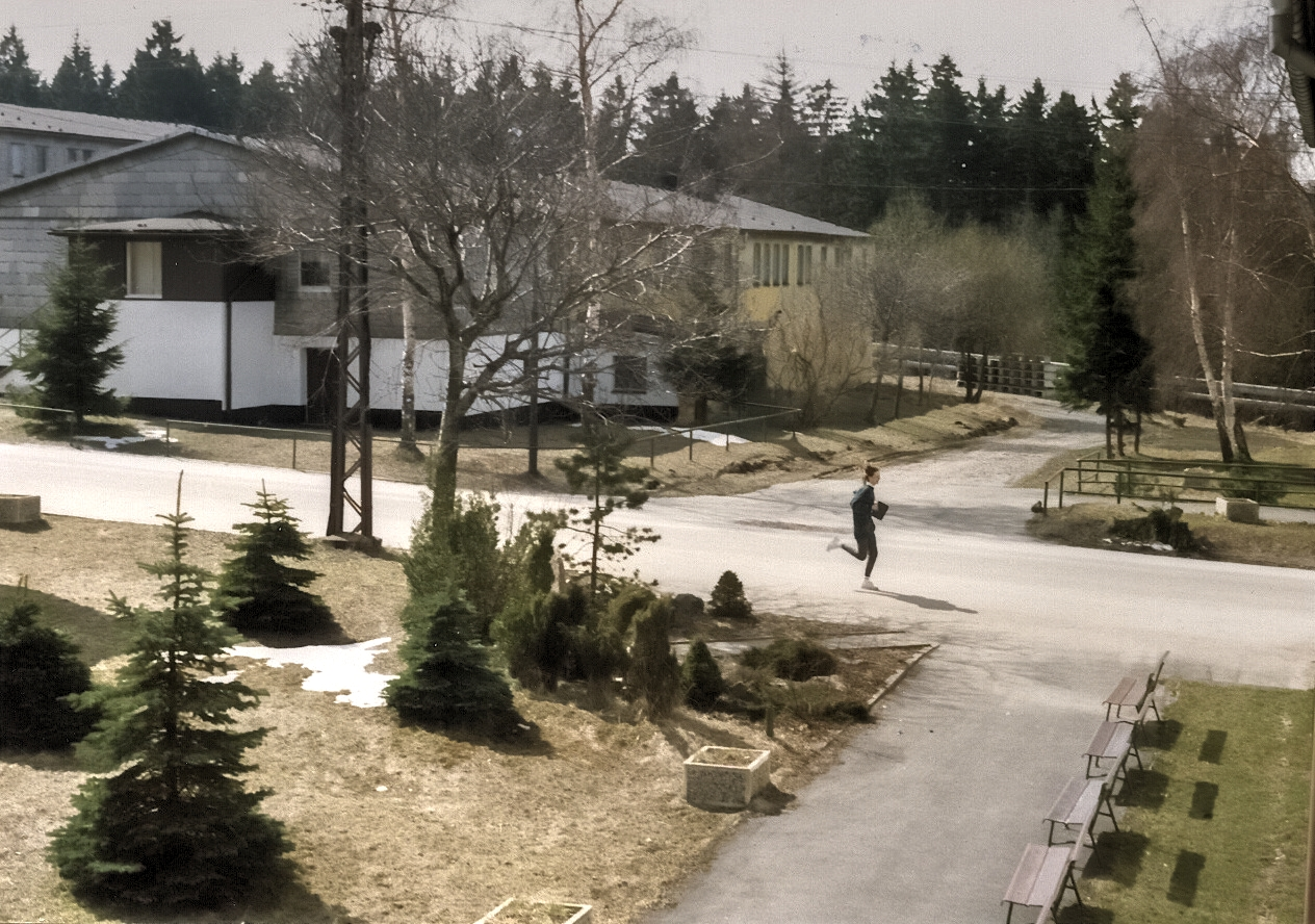 Ansicht über einen Teil des Geländes von Neuoberhaus im Frühjahr 1992, kurz vor Schließung der Betriebsschule. Das Foto wurde aus dem Schulgebäude in Richtung der Hauptstraße gemacht. Im Hintergrund zu sehen ist die Kantine.